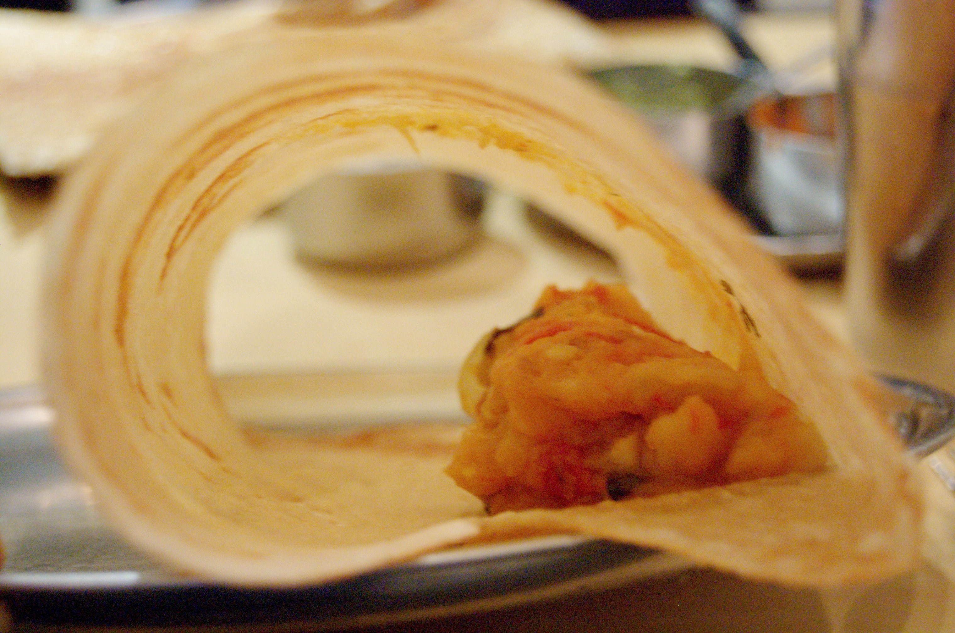 my dosa. good lord.